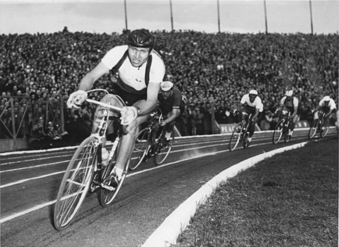 VIII. Friedensfahrt, Krolak, Stadioneinfahrt Zentralbild CAF-V Bey-Ho 18.5.1955 - VIII. Internationale Radfernfahrt Prag-Berlin-Warschau. UBz: Die letzten Meter der VIII. Internationalen Friedensfahrt werden im Warschauer-Stadion zurückgelegt. Der polnische Fahrer Krolak führt das Hauptfeld an. Im Hintergrund erkennen wir Meister II und (ganz rechts) Schur (beide DDR).